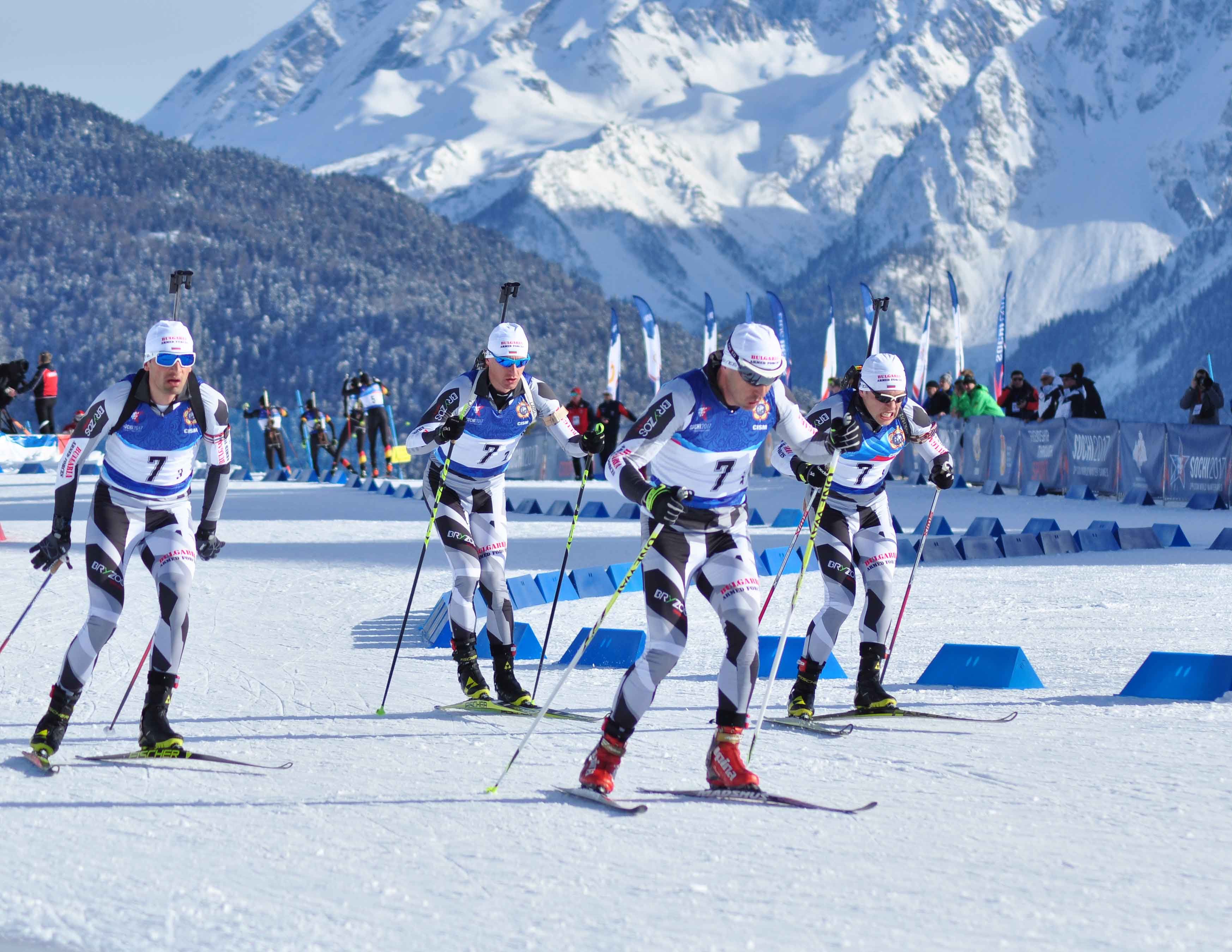 третьи зимние Всемирные военные игры, разное